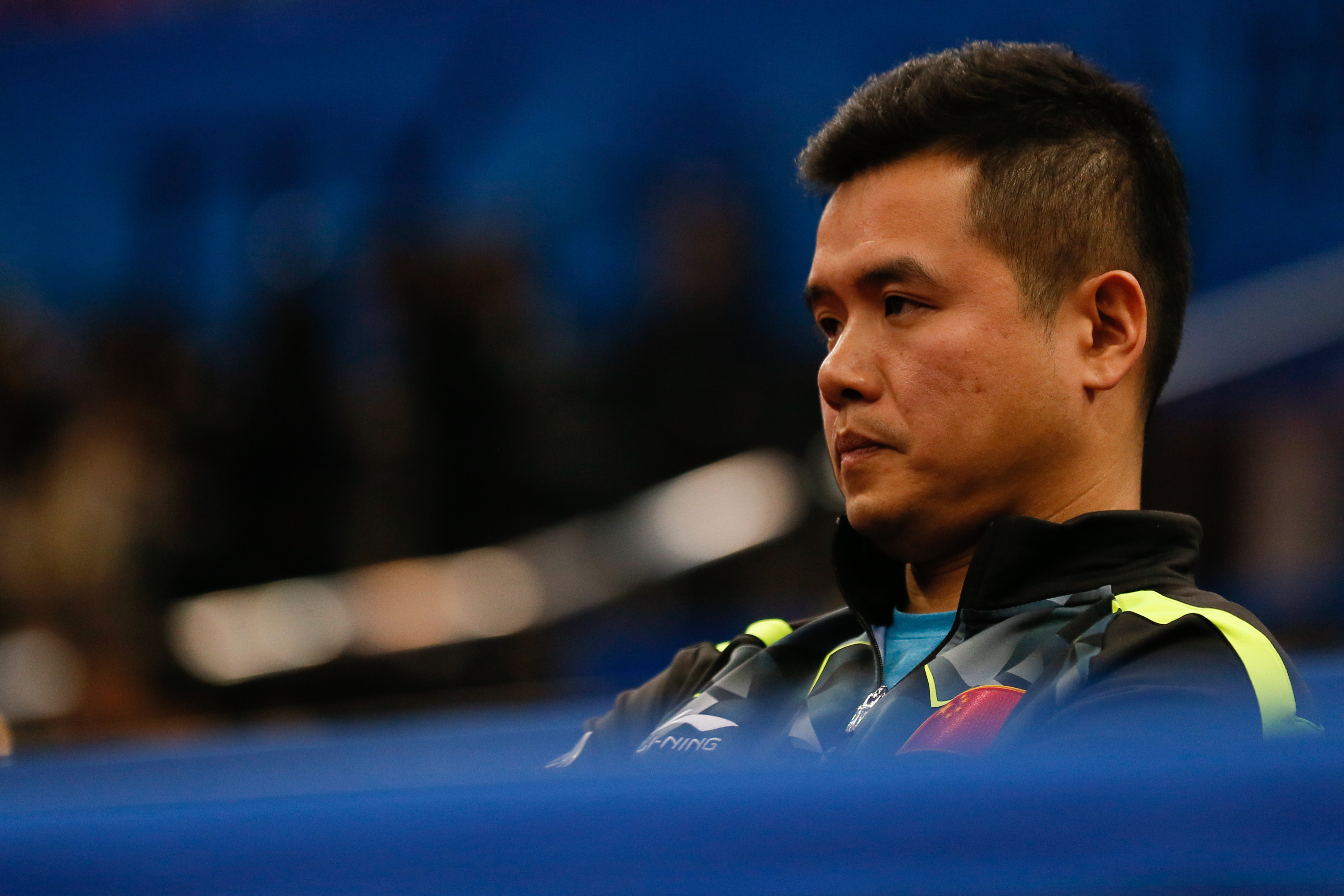 _K0K6649